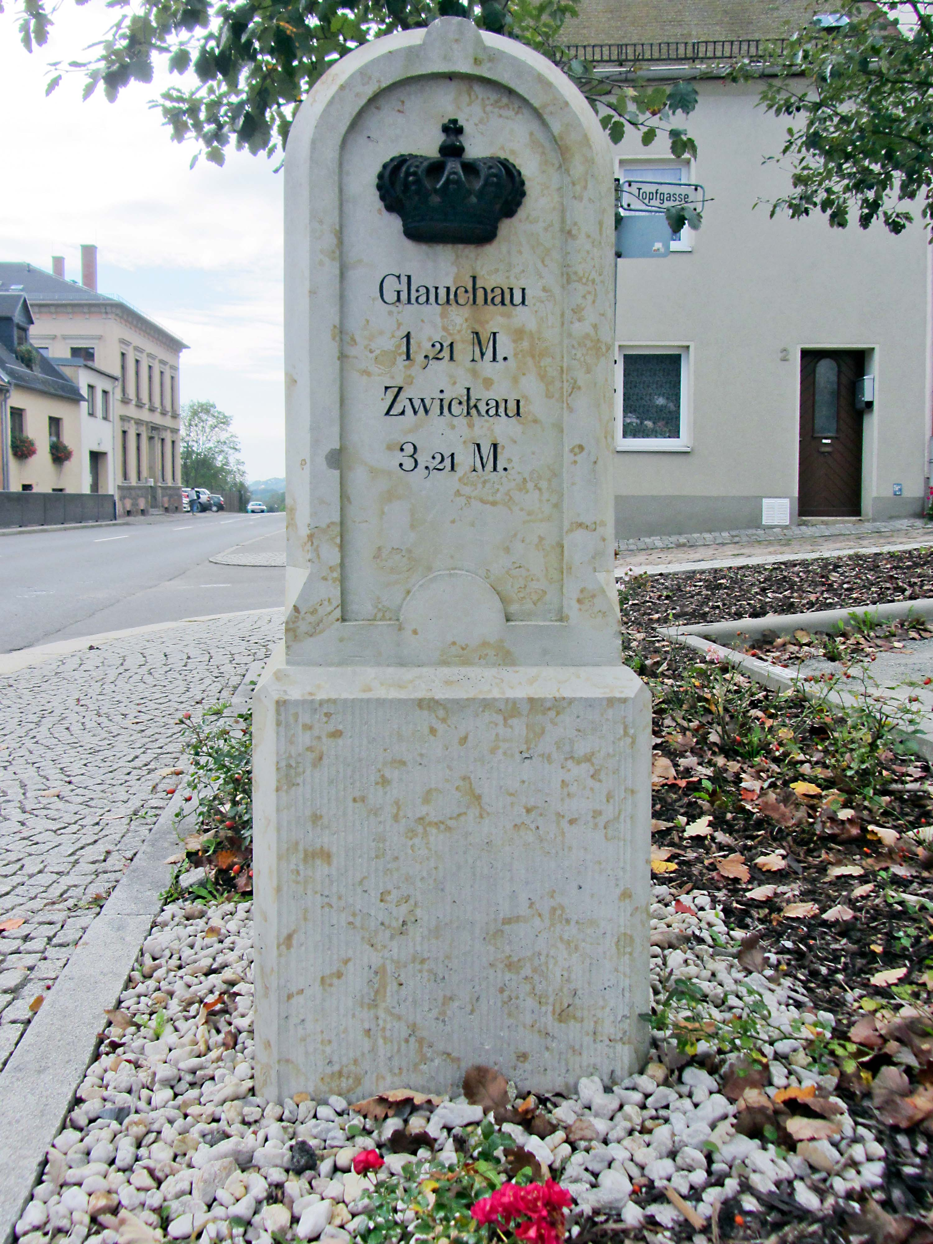 Königlich sächsischer Stationsstein, Glauchauer Straße [B 180] in Waldenburg Text: Seite 1: Waldenburg ; Seite2: Glauchau 1,21 M. / Zwickau 3.12 M.